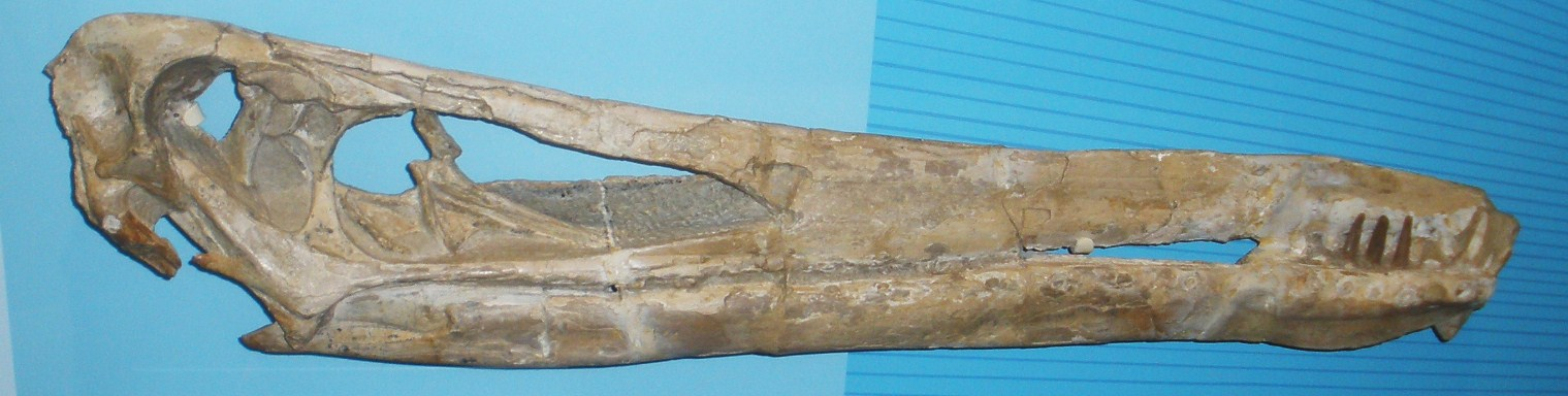 Fossil of Anhanguera, an extinct pterosaur- Took the photo at Senckenberg Museum of Frankfurt